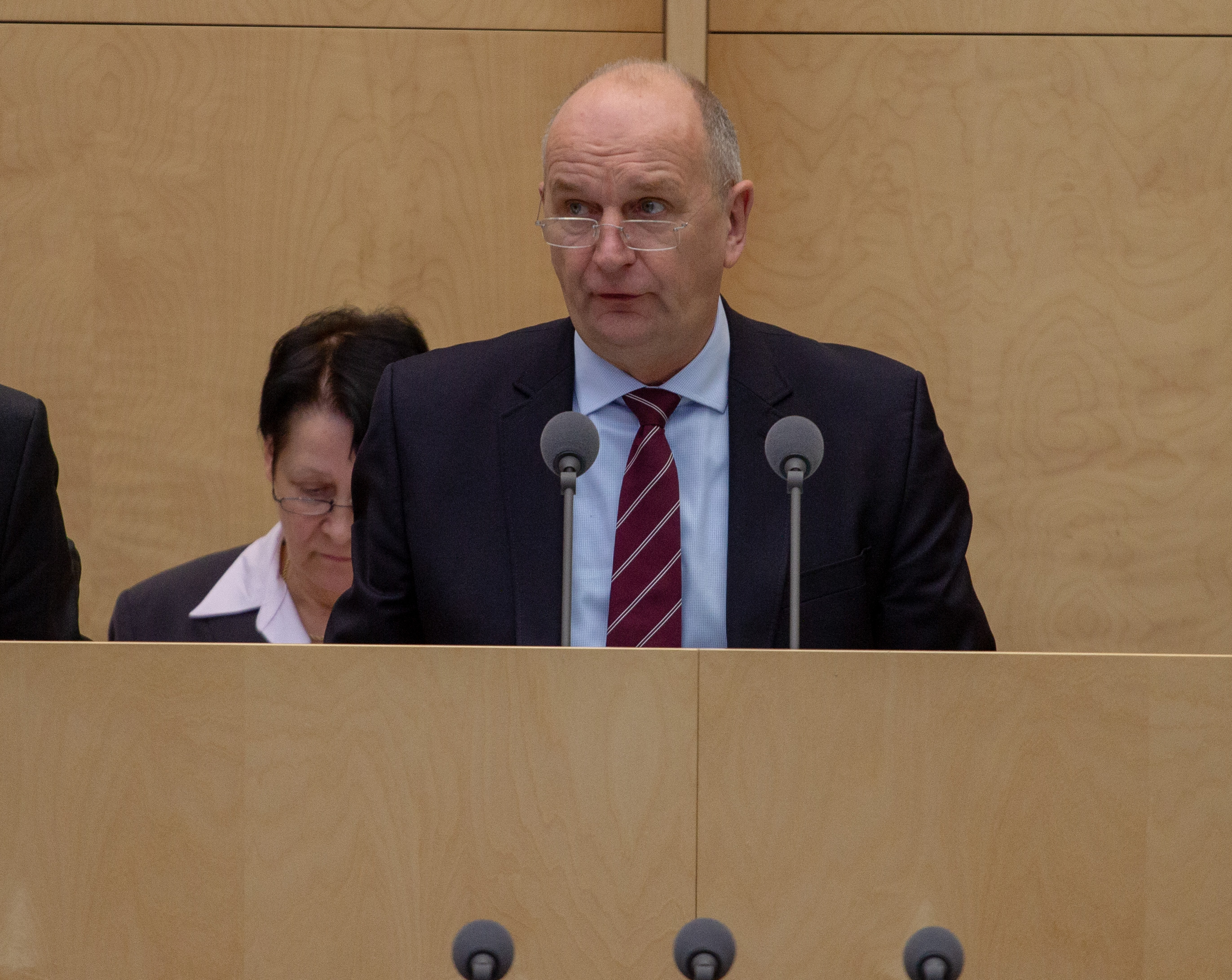 Plenarsitzung des Bundesrates am 12. April 2019 in Berlin.